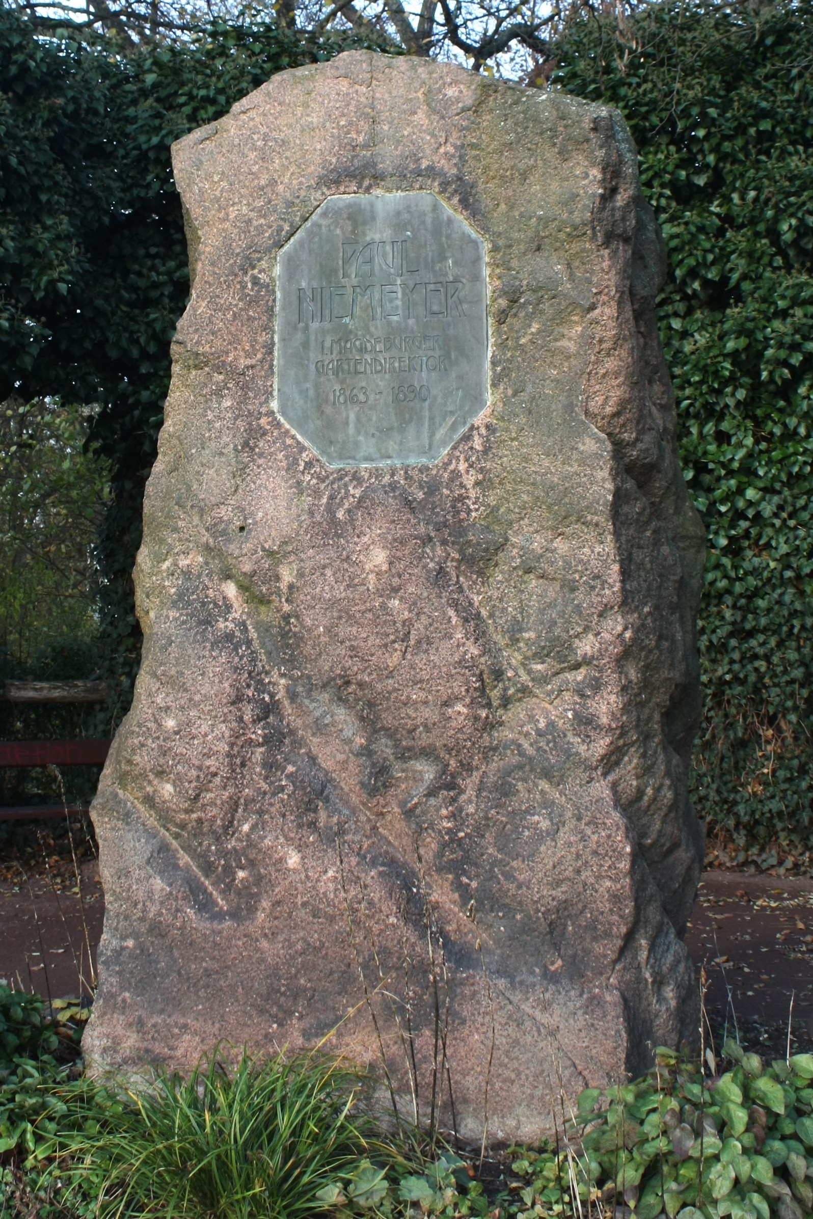 Gedenkstein fuer Paul Niemeyer im Rotehornpark Magdeburg